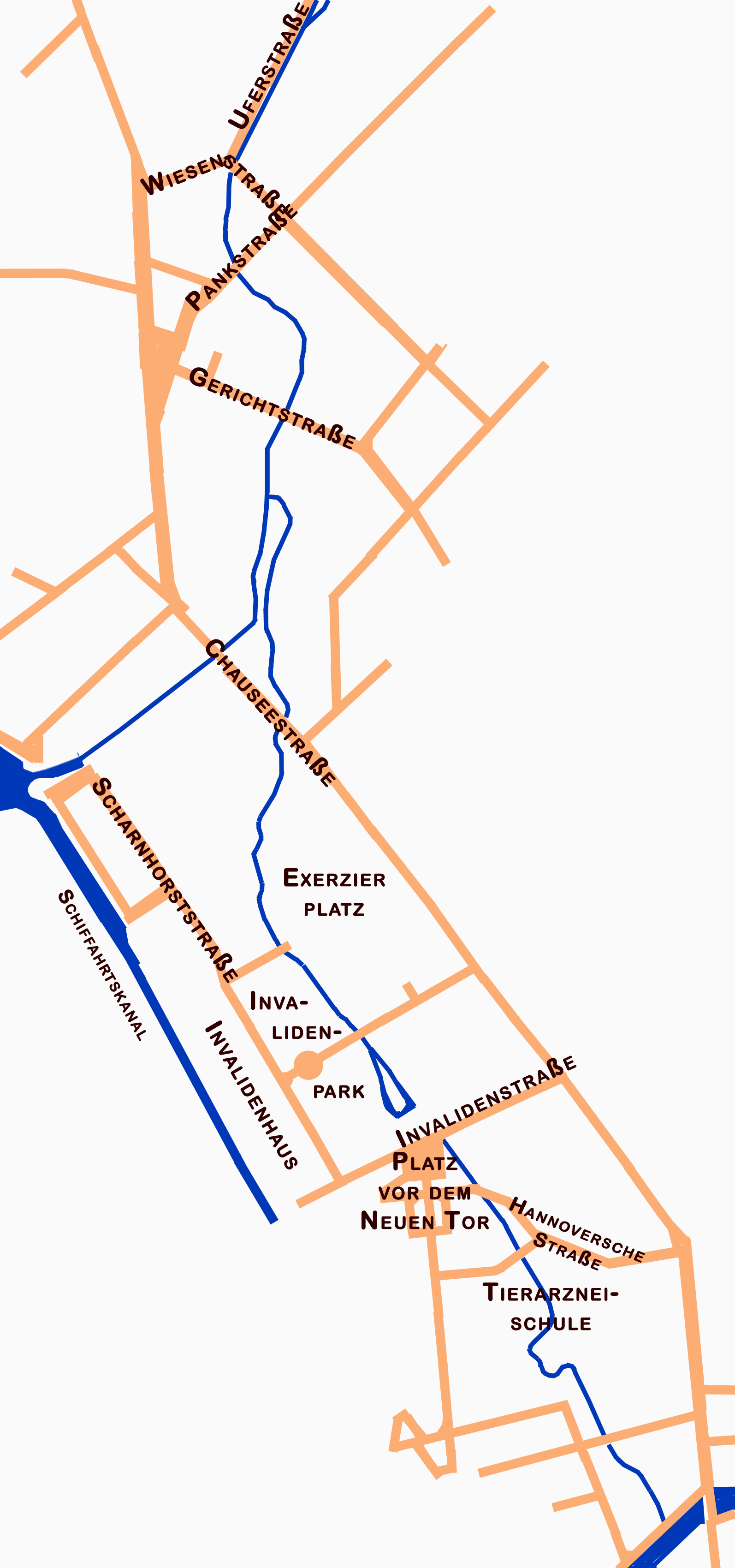 Panke - Verlauf der Panke im innerstädtischen Bereich von Berlin -, gezeichnet nach dem Plan von Hobrecht vom Jahre 1862. Brücken über die Panke. Von der Mündung aufwärts: Schiffbauerdamm, Reinhardstraße, Philippstraße, Hannoversche Straße, Invalidenstraße, Invalidenpark zur Chausseestraße, Scharnhorststraße zum Exerzierplatz, Chausseestraße,Gerichtsstraße, Pankstraße, Wiesenstraße